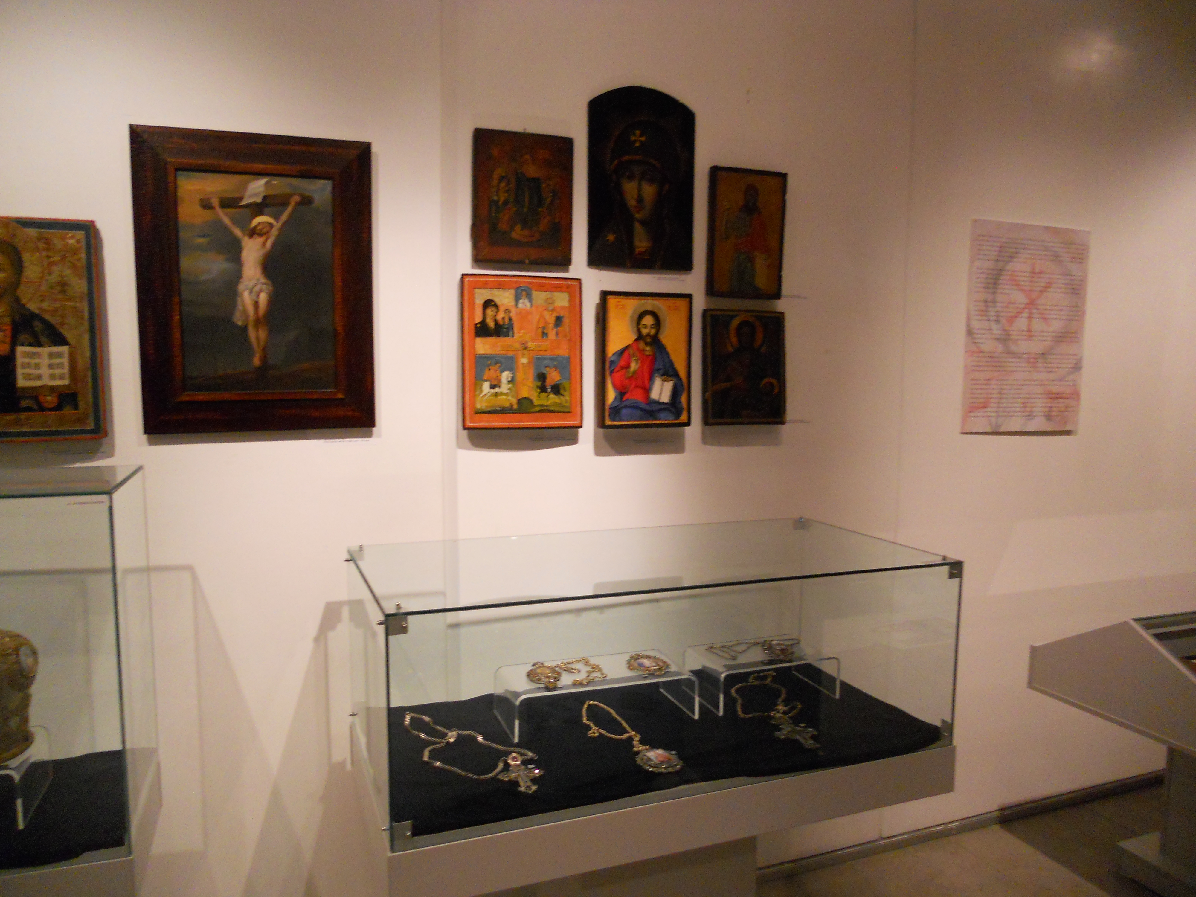 Српски (ћирилица): Ikone i drugi obredni predmeti iz bogate riznice Niške eperhije, kao deo postavke na izložbi "Hrišćanstvo u Nišu kroz vekove", januar 2013. Autor Milorad Dimc MD.